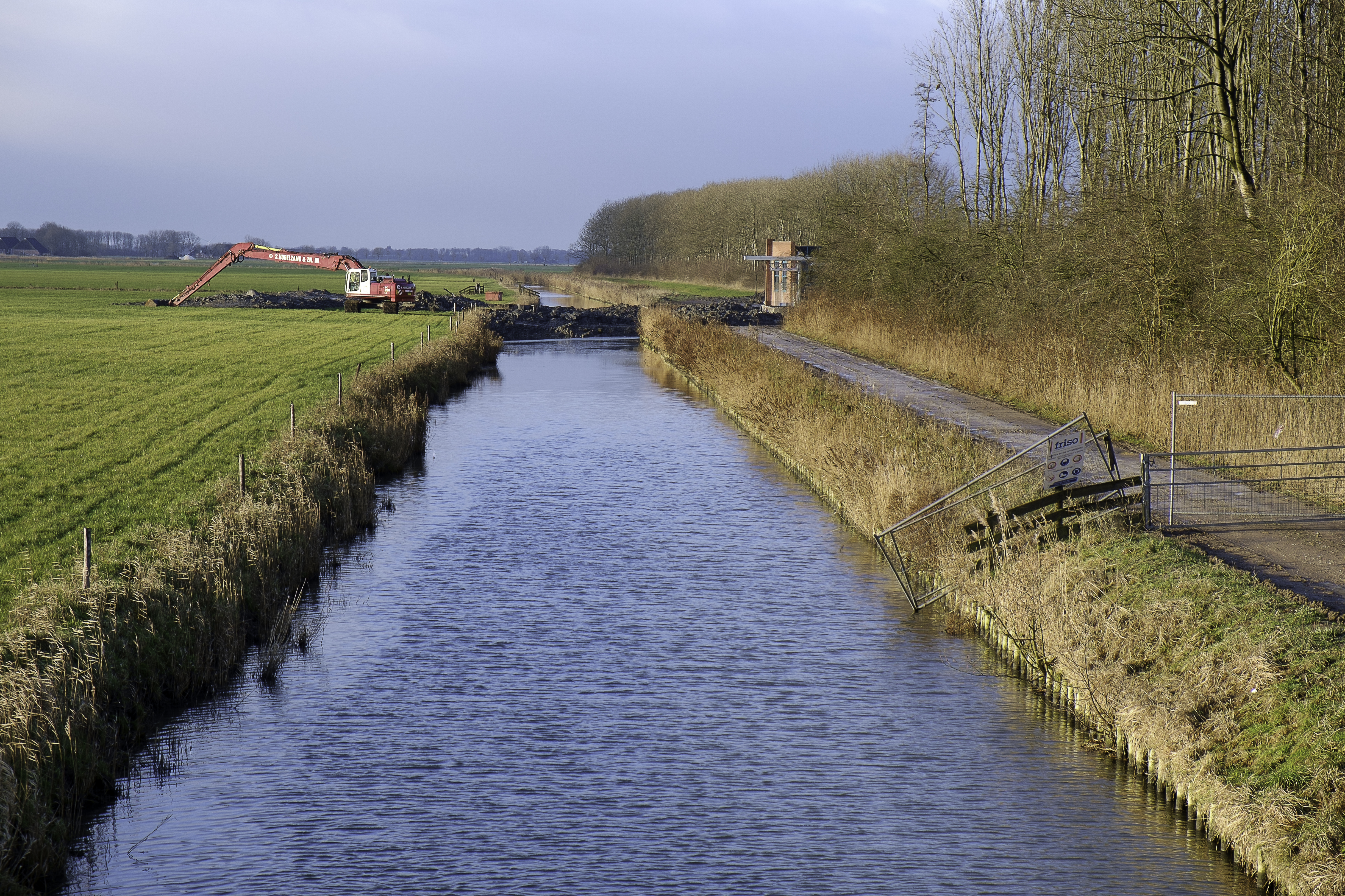 Usquerdermaar bij de vuilstort